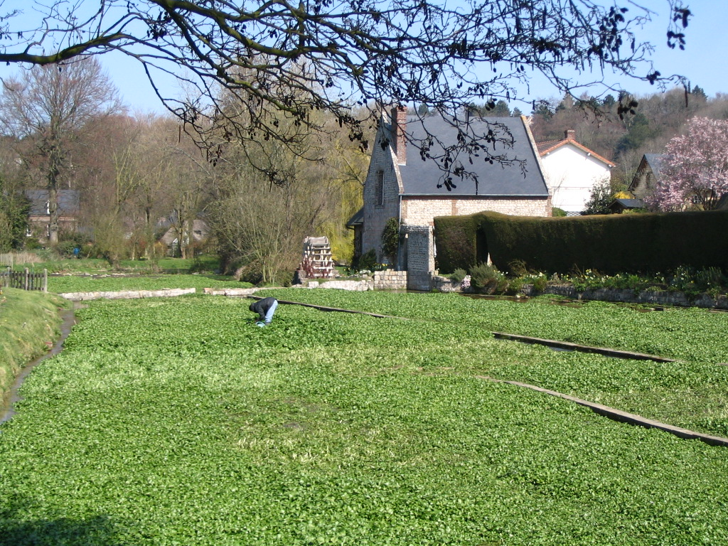 Cressonnière sur la Veules, à Veules-les-Roses (Seine-Maritime, France).